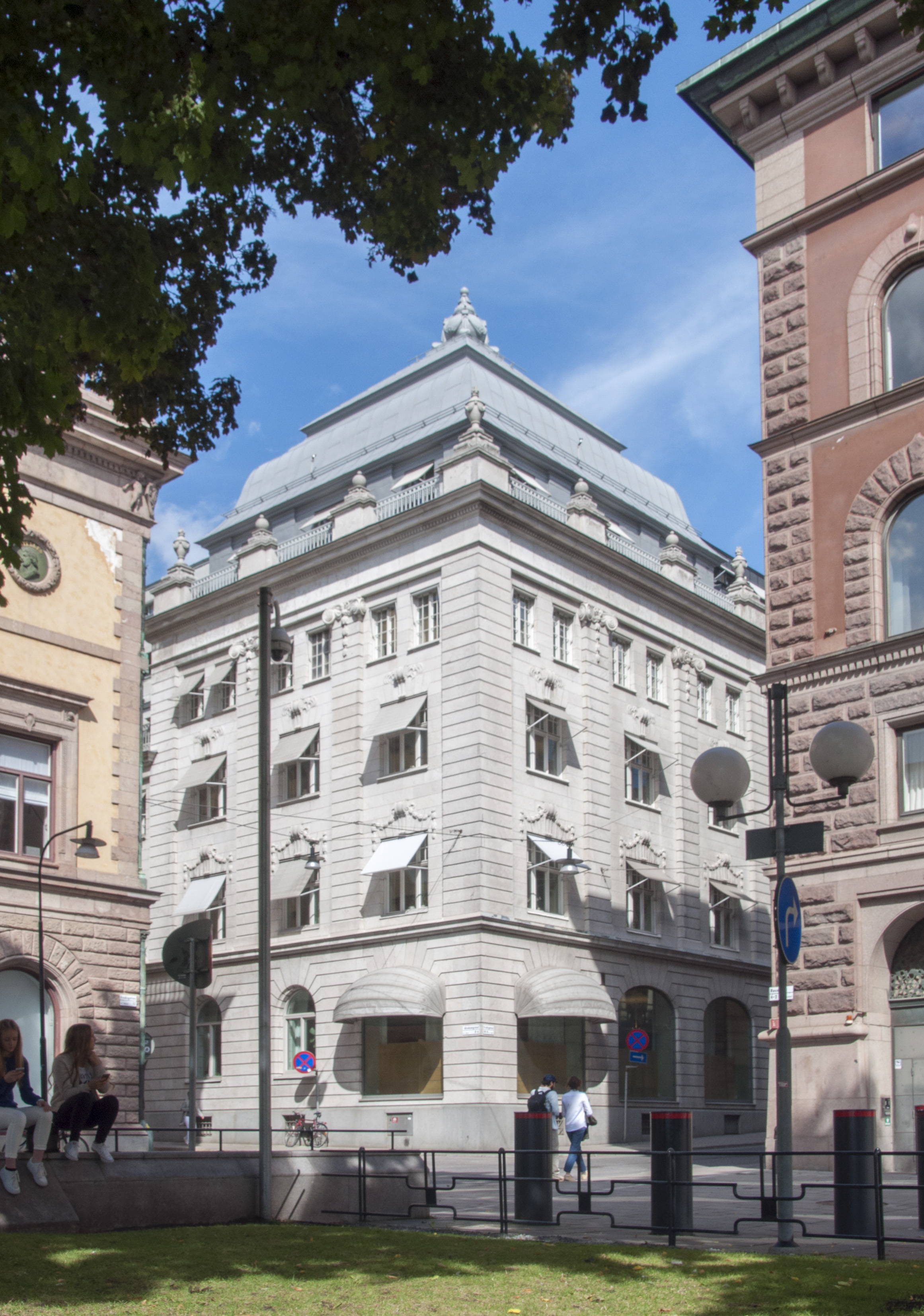 Tidigare Norrlandsbanken, Fredsgatan 10 och Akademigränd 6 Stockholm. Byggnadsår 1902-1904. Arkitekt Ernst Stenhammar